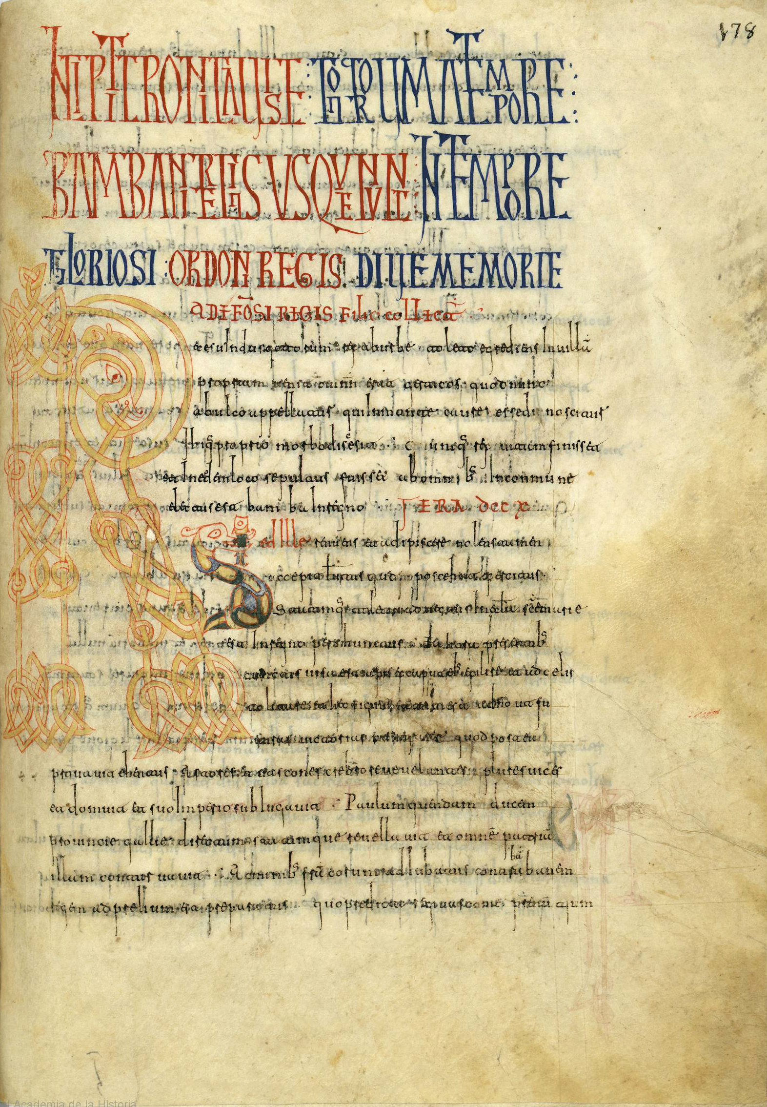 Comienzo de la Crónica de Alfonso III de Asturias. Folio 178 recto del Códice de Roda, conservado en la Real Academia de la Historia (España), siglo X-XI, 232 folios (29 x 21 cm) en pergamino. Escritura visigótica.